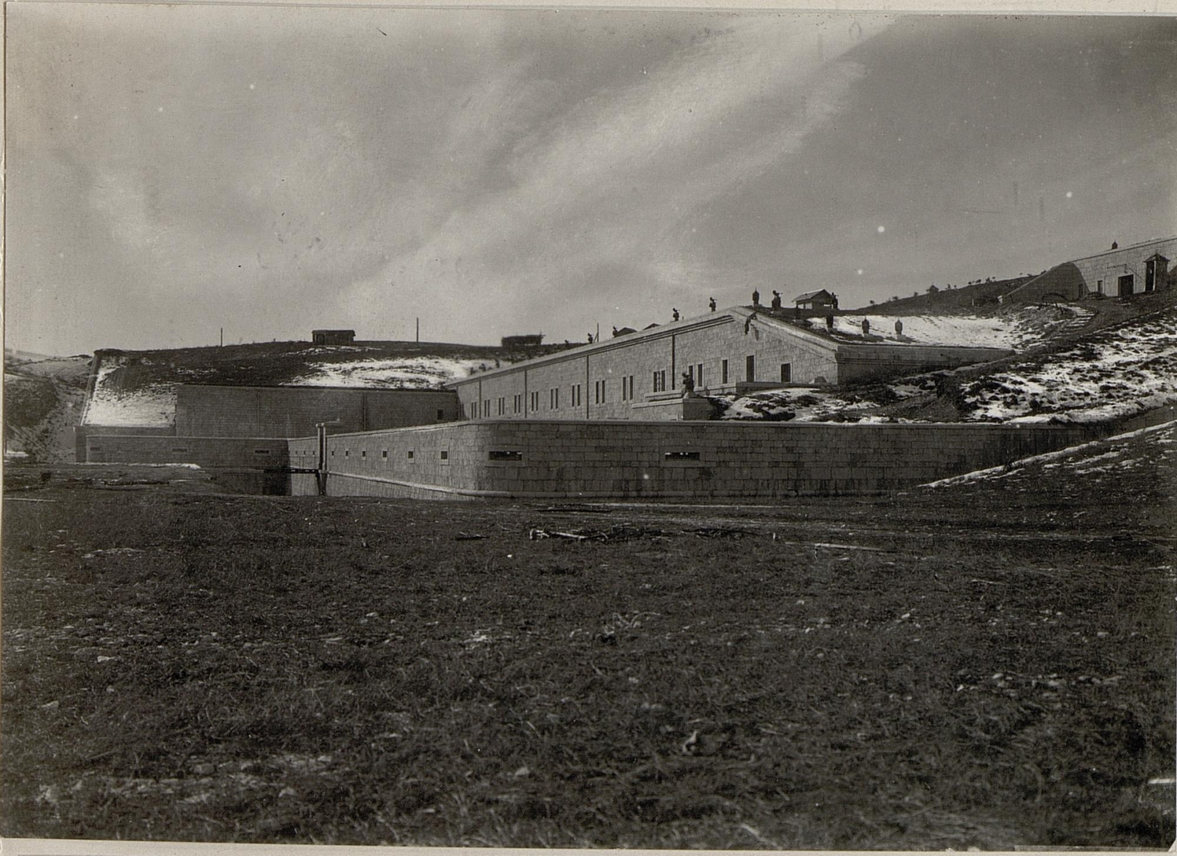 Cima di Campo.Tags zuvor erobertes italienisches Werk.